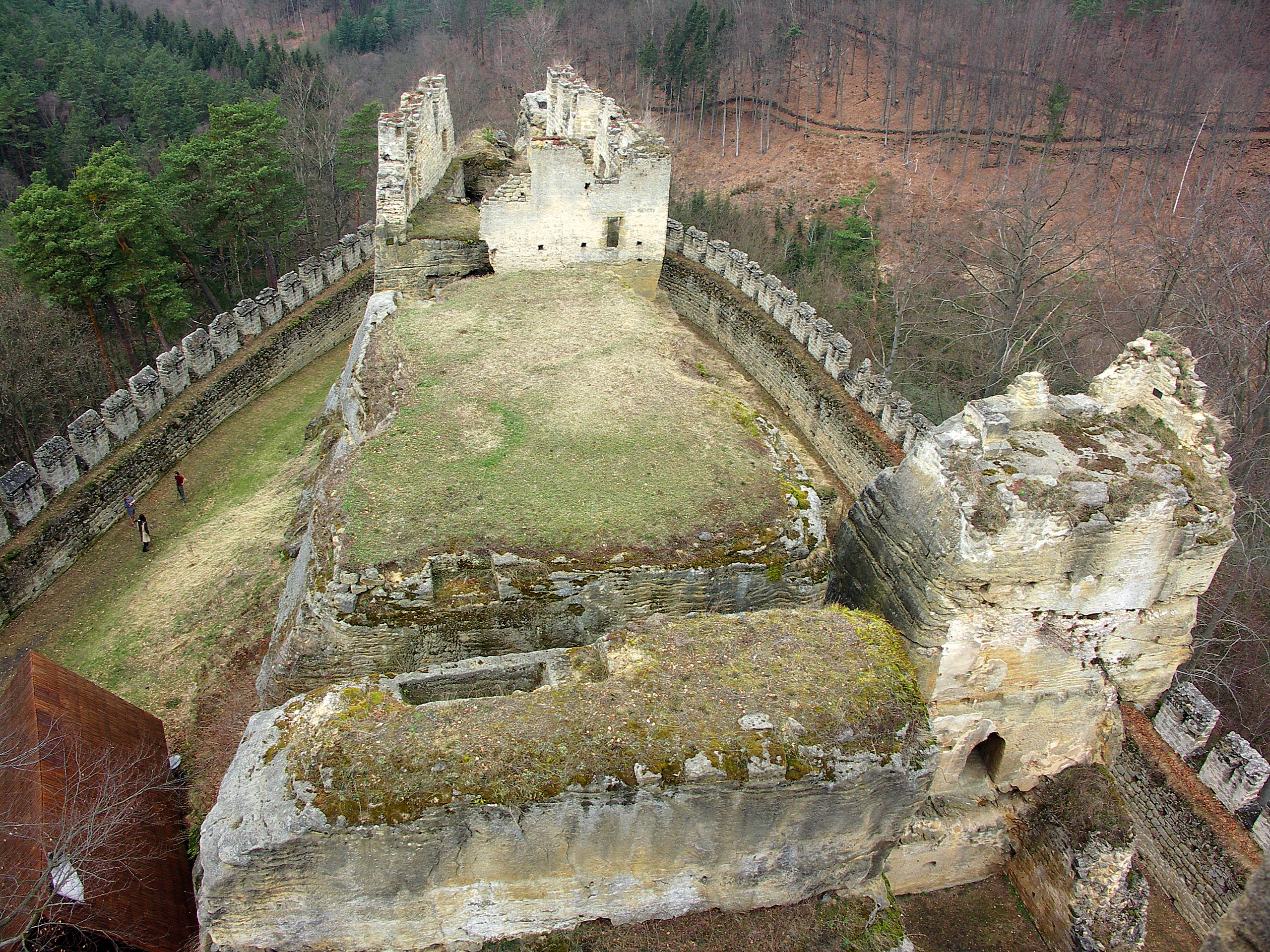 Hrad Helfenburk, zřícenina (Rašovice), Rašovice